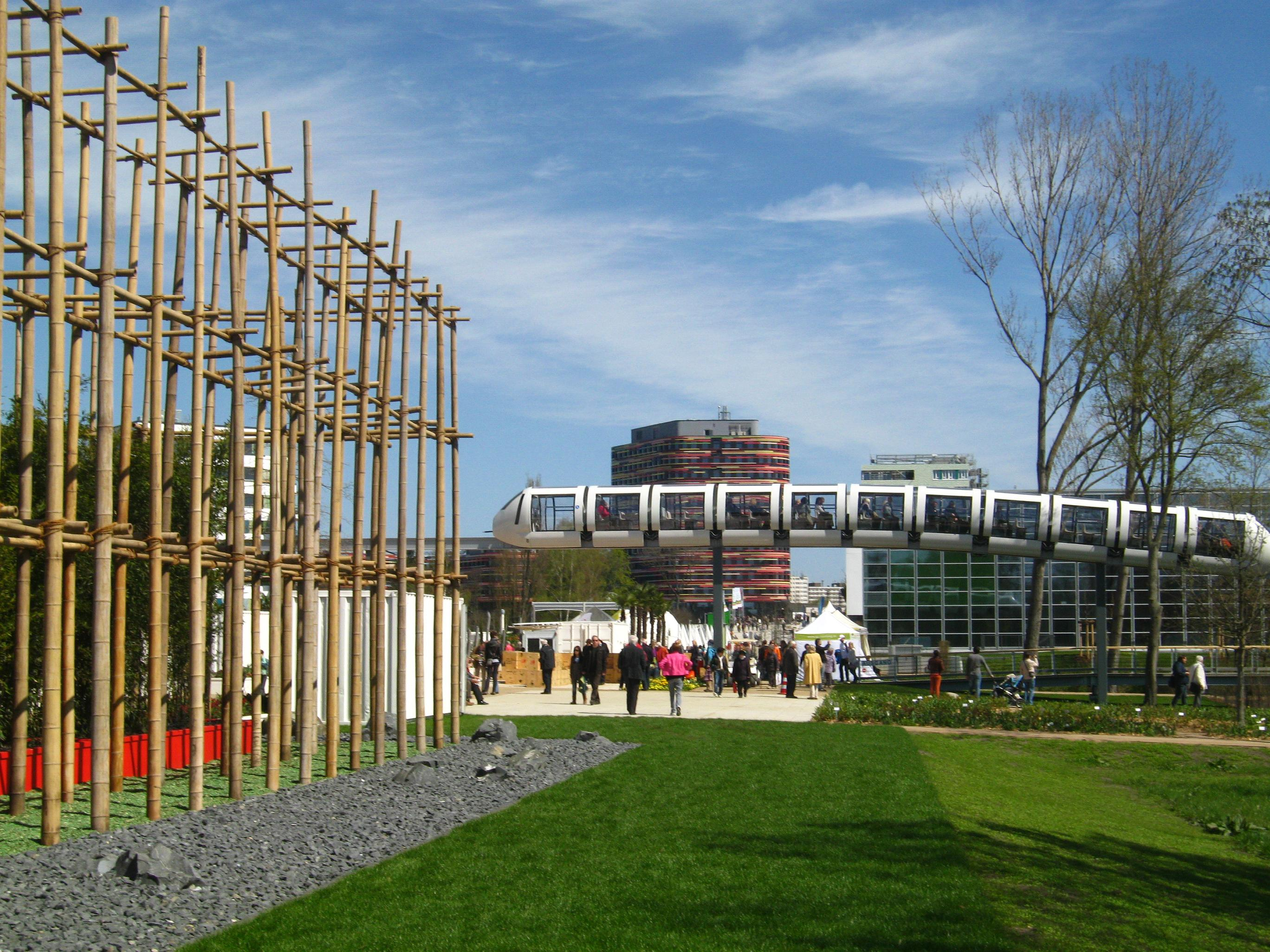 Garten "Bamboon-Town" - Baukunst aus Hongkong - auf der Internationalen Gartenschau Hamburg 2013.